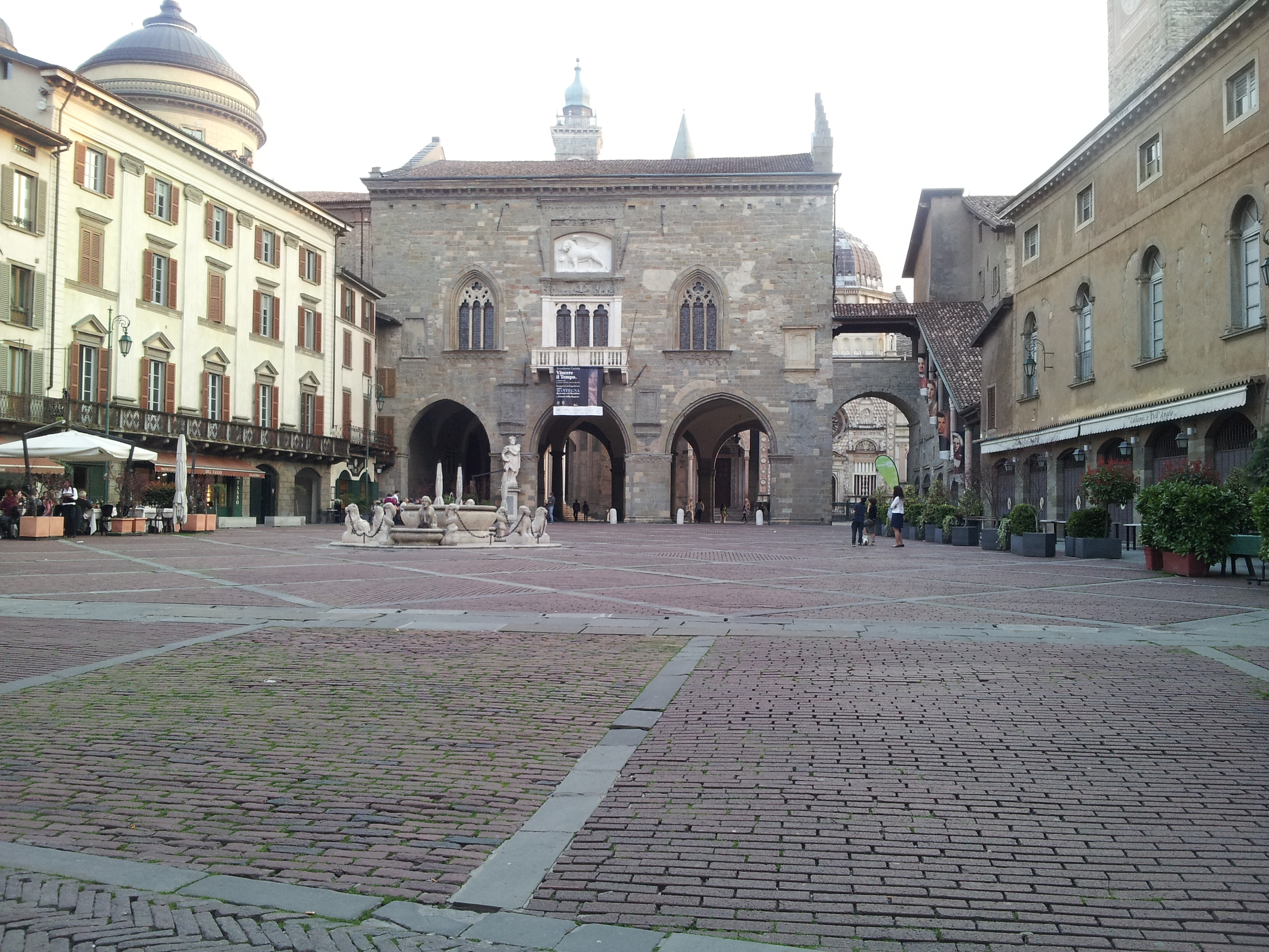 Vista di piazza vecchia.